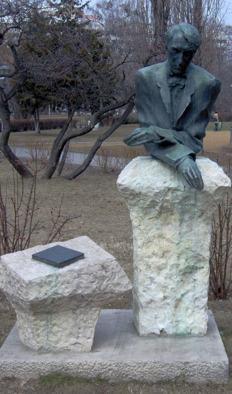 Statue of famous Hungarian poet, Dezső Kosztolányi